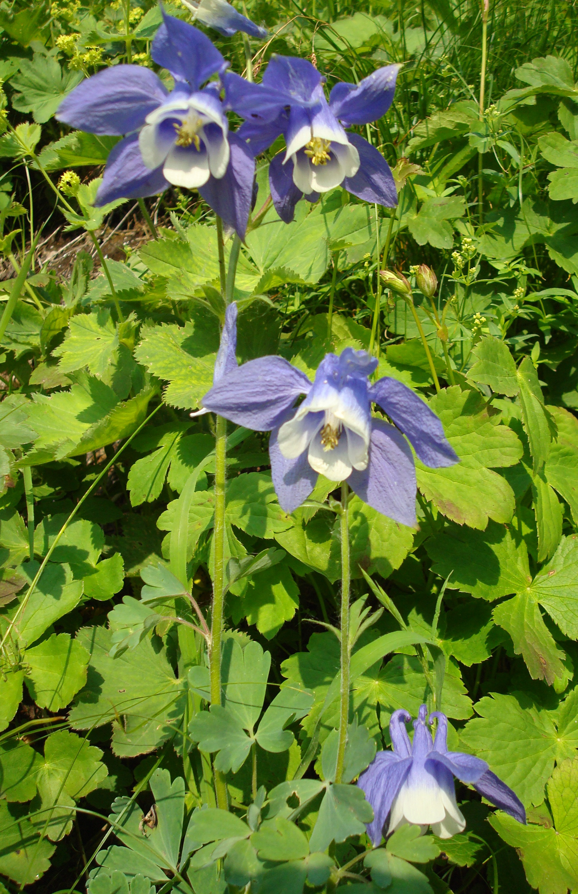 Кавказский государственный природный биосферный заповедник. Водосбор олимпийский. Дикорастущее растение Кавказского государственного природного биосферного заповедника. Снимок сделан в Западном отделе заповедника в районе горы Фишт. This image is related to the protected area of Russia number 2300002